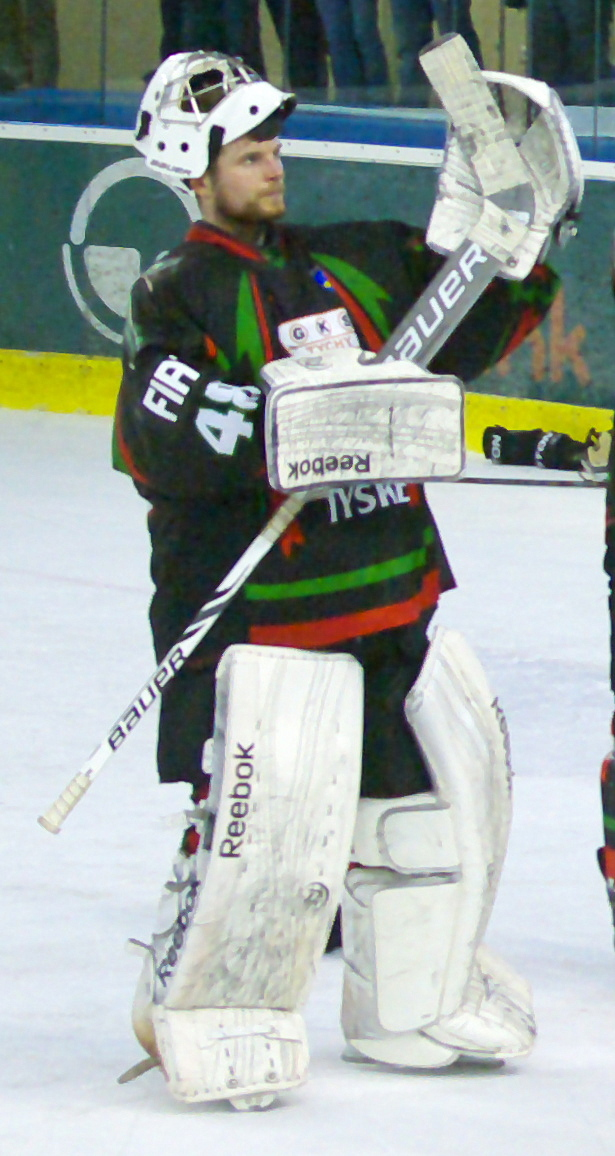 Szósty mecz finałowy o mistrzostwo Polski w hokeju na lodzie w sezonie PHL 2013/2014: Ciarko PBS Bank KH Sanok – GKS Tychy (2:0), 3 kwietnia 2014 w Sanoku (Arena Sanok). Štefan Žigárdy